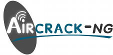 Logo von Aircrack